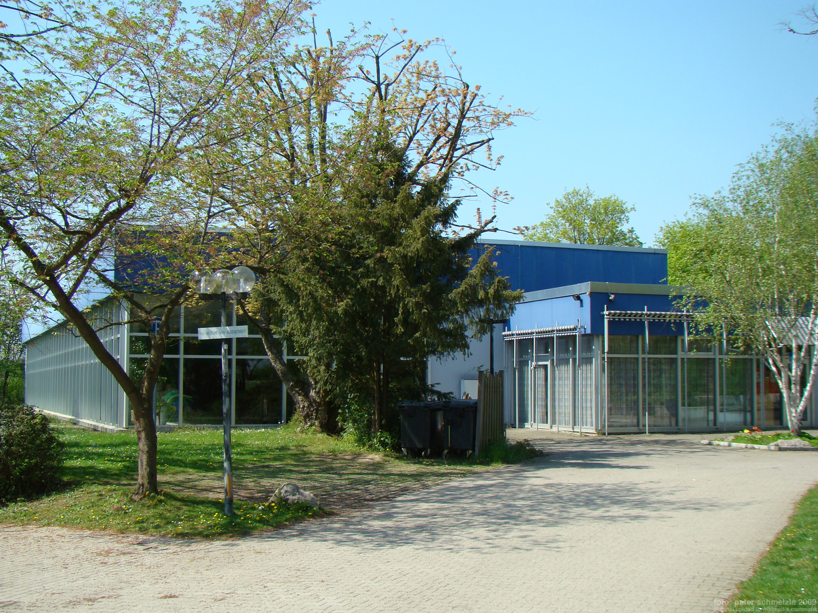 Hallenbad Biberach, Bibersteige 17, Heilbronn-Biberach